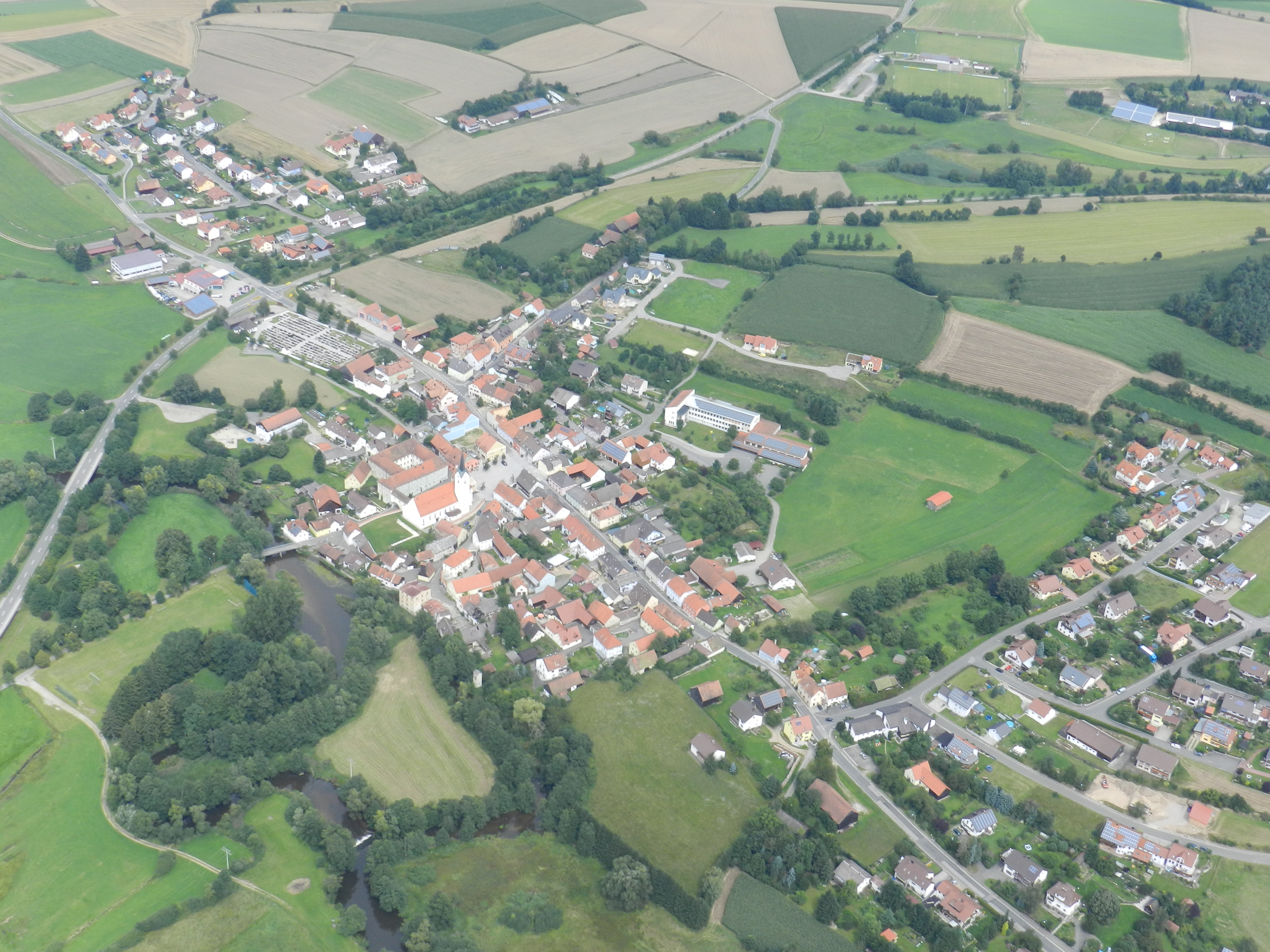 Schwarzhofen am Fluss Schwarzach, Landkreis Schwandorf, Oberpfalz, Bayern, Luftaufnahme (14.August 2011)